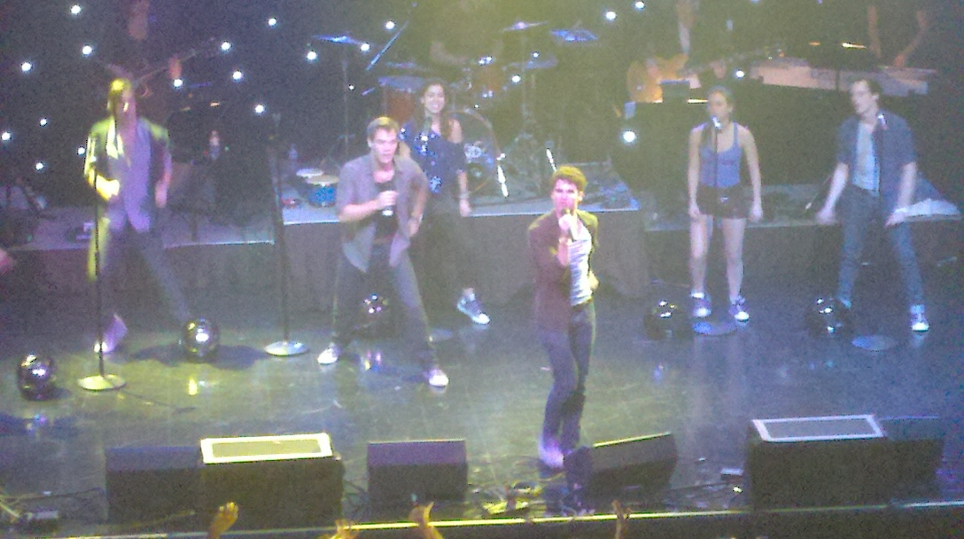 Členové Teamu Starkid na koncertě.